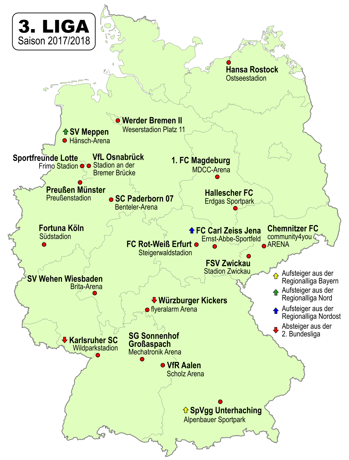 Karte der Vereine der 3. Fussball-Liga 2017/2018